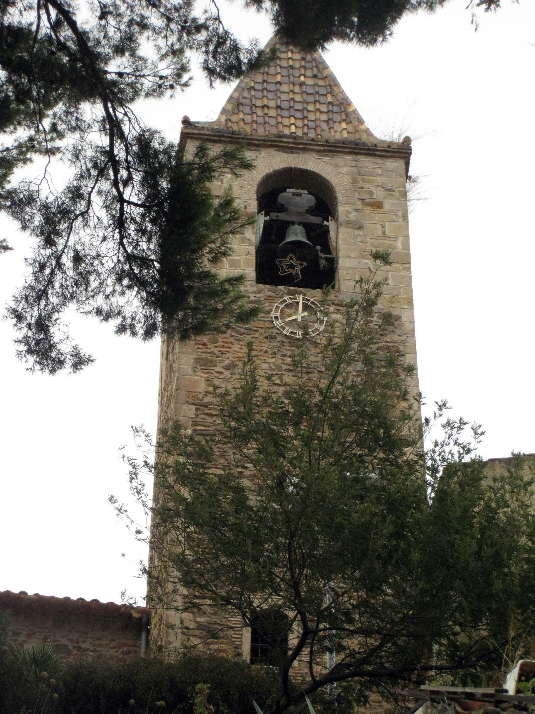 Conjunt de Sant Genís dels Agudells (Barcelona)